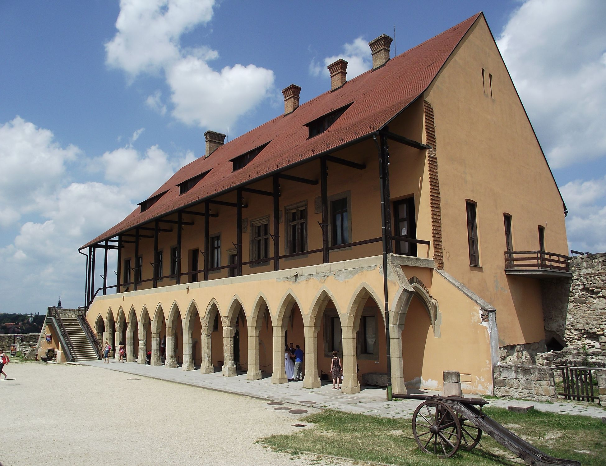 Eger, vár, gótikus palota